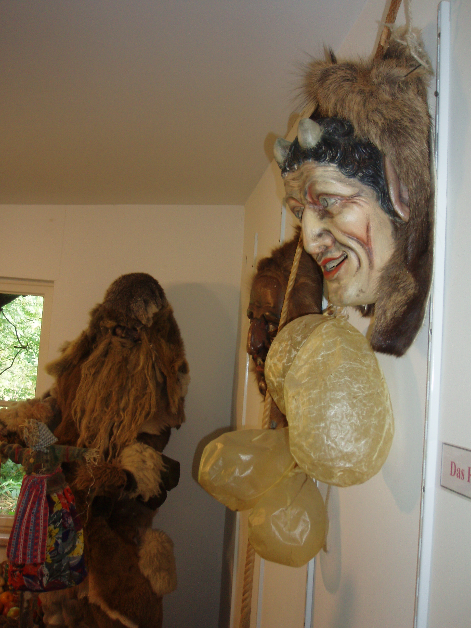 Saublasen und Klausenkostüme im Museum Obere Mühle in Bad Oberdorf (fotografieren ist dort erlaubt)